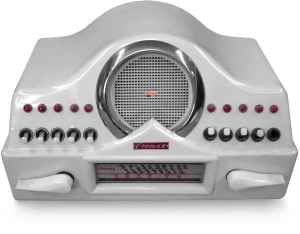 Radio-intercomunicador fabricado por Fermax